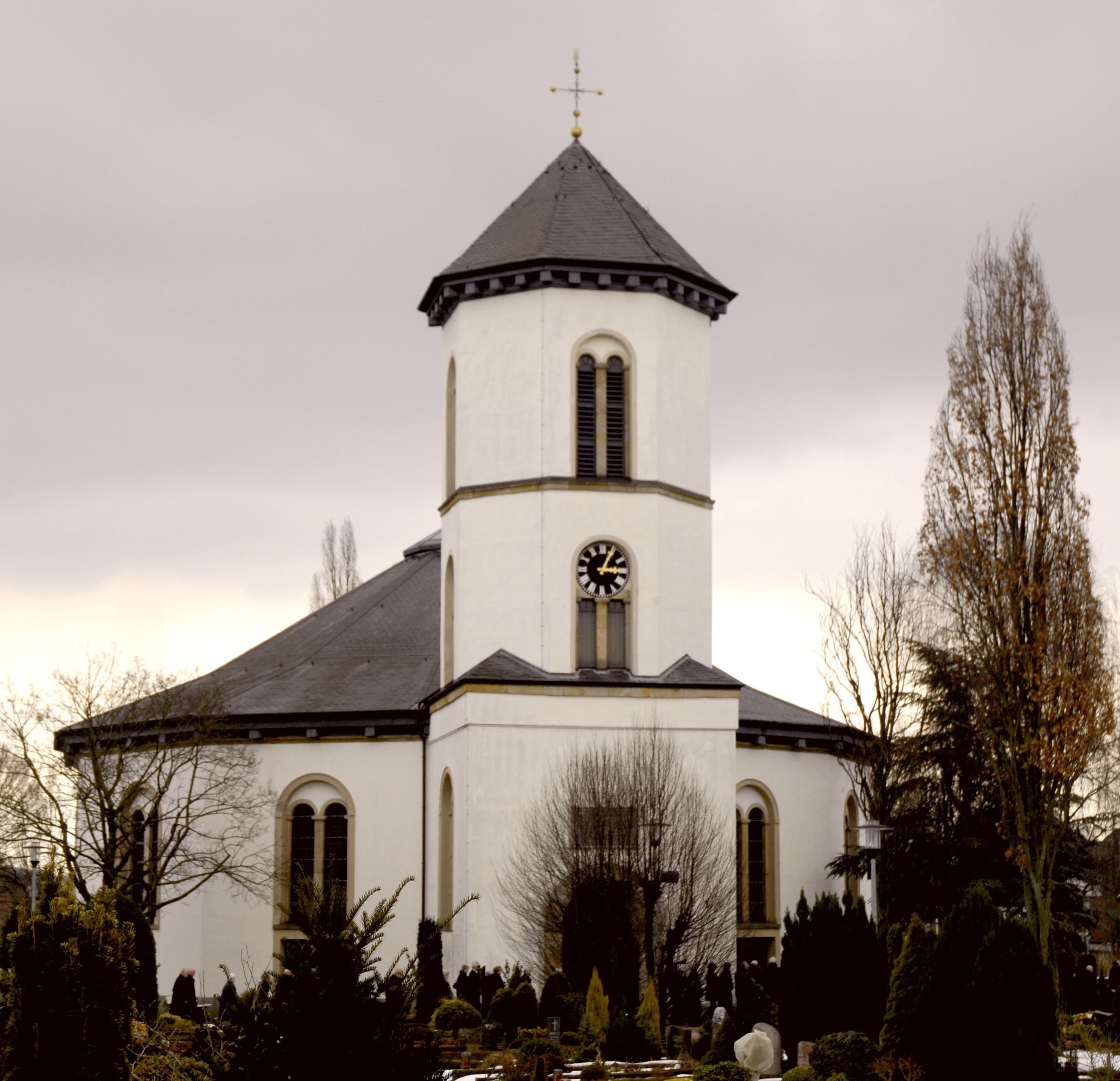 Gesmold, katholische Kirche St. Petrus